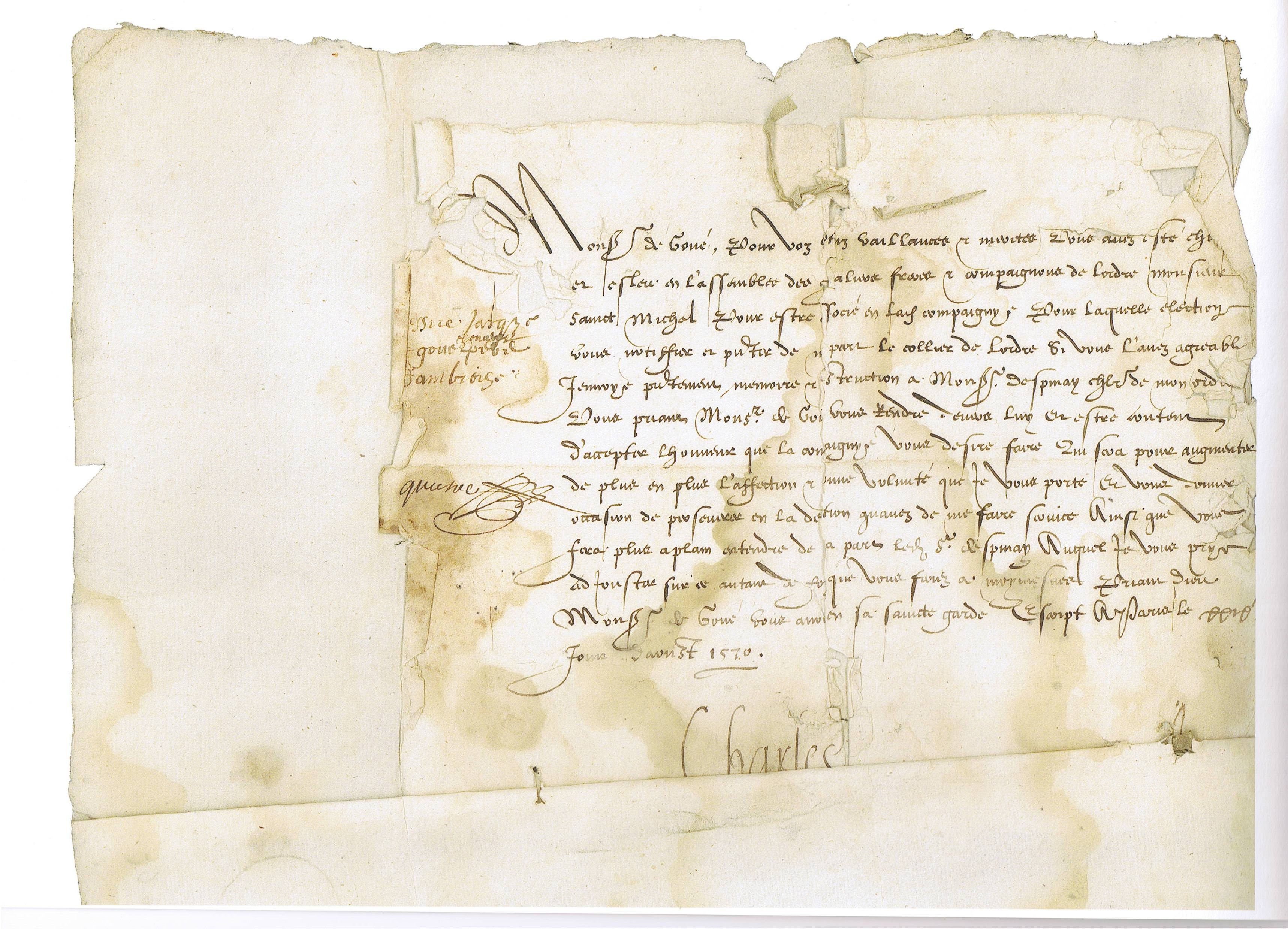 Acte de Charles IX portant nomination de Jacques de Goué comme chevalier de l'l'ordre de Saint Michel, 1570